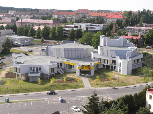 Tachov, Albert, OC Kaskády, Zámecká 2111.